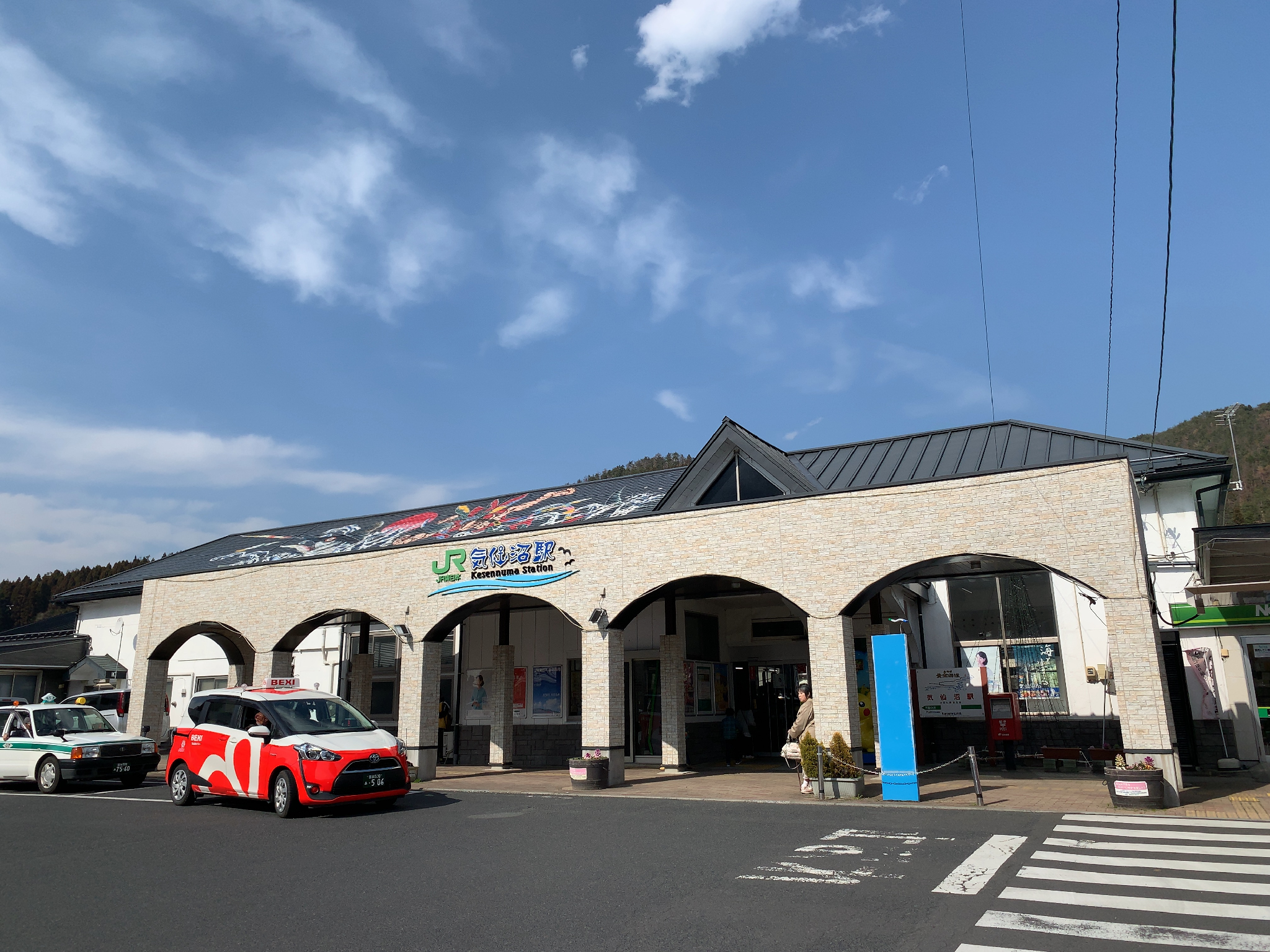 JR気仙沼駅 駅舎